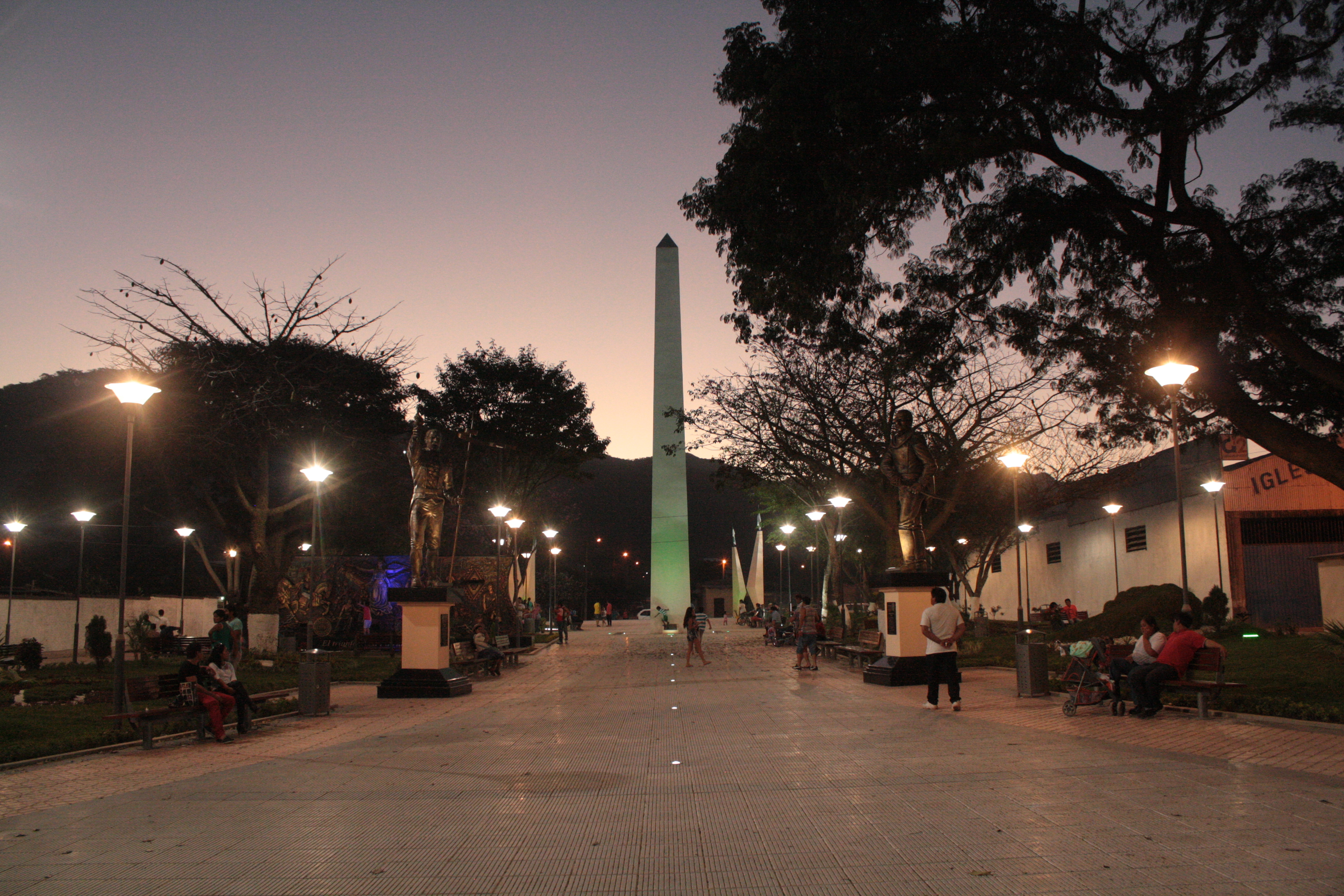 Obelisco de la Plaza "Los Libertadores" zona Barrio San Francisco, Yacuiba. Obra construida por el Gobierno Autónomo Municipal De Yacuiba en la Gestión del Alcalde Carlos Brú como homenaje a los heroes bolivianos y a la historia de nuestra patria. Fotografía tomada por José Luis Claros López